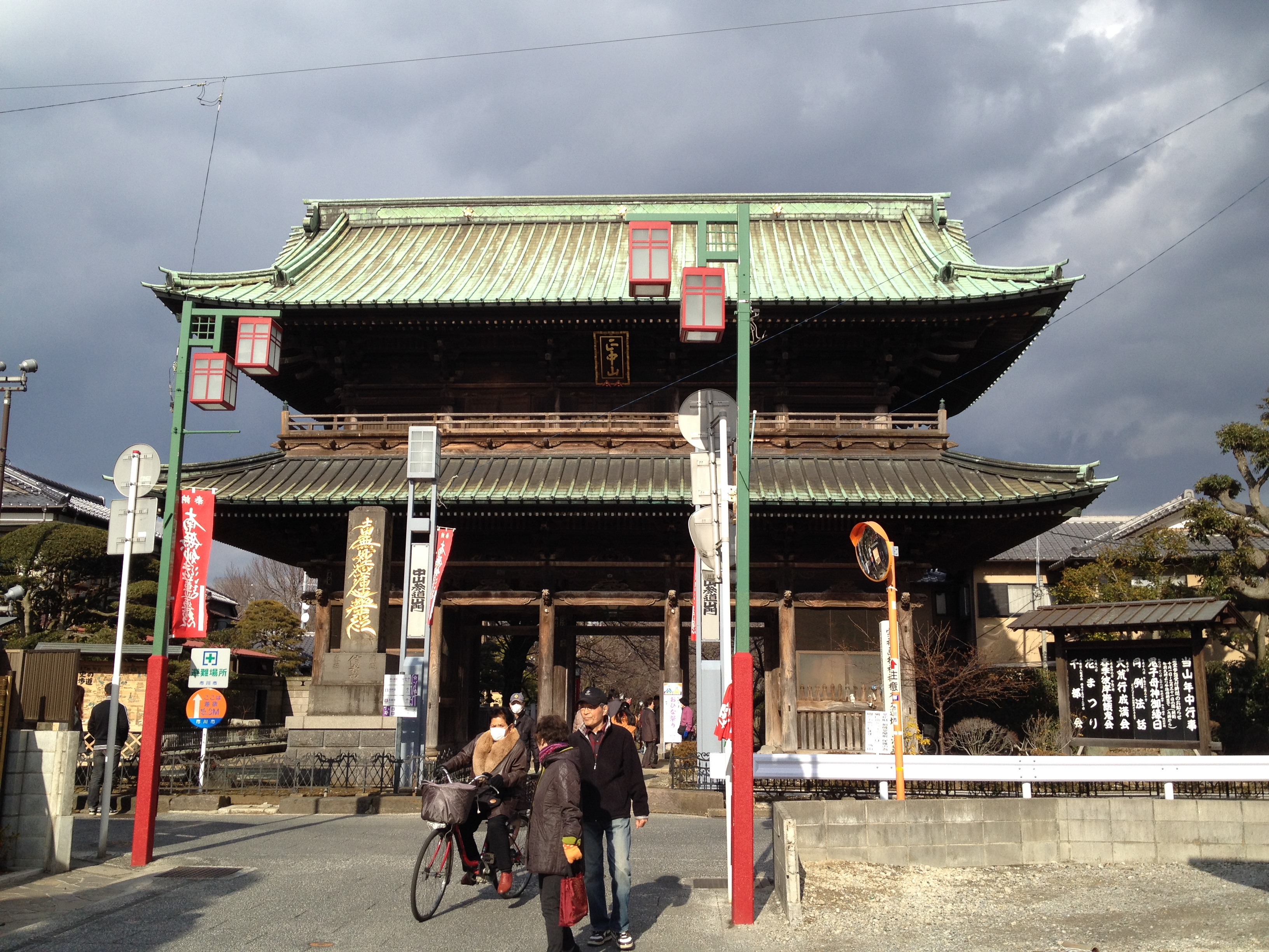 中山法華経寺 三門